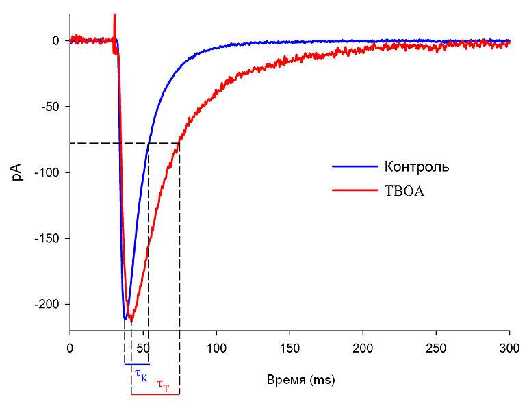 Запись электрического тока, генерируемого АМРА-рецепторами нейрона гиппокампа в ответ на электрическую стимуляцию нервной ткани